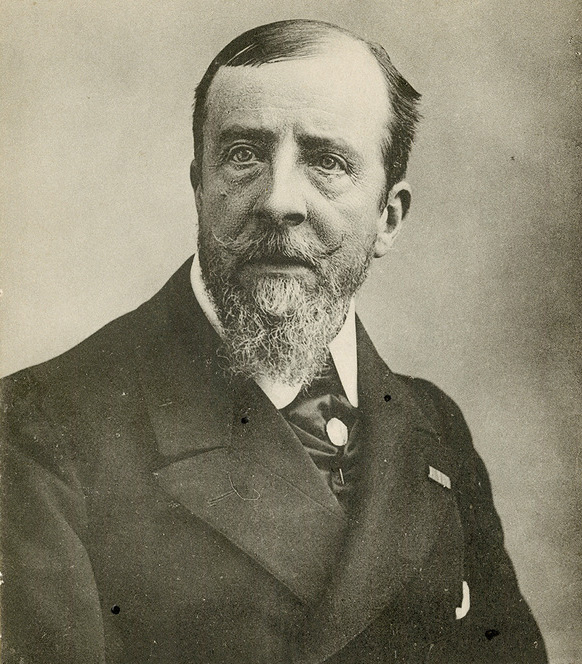 Paul Déroulède, carte postale.